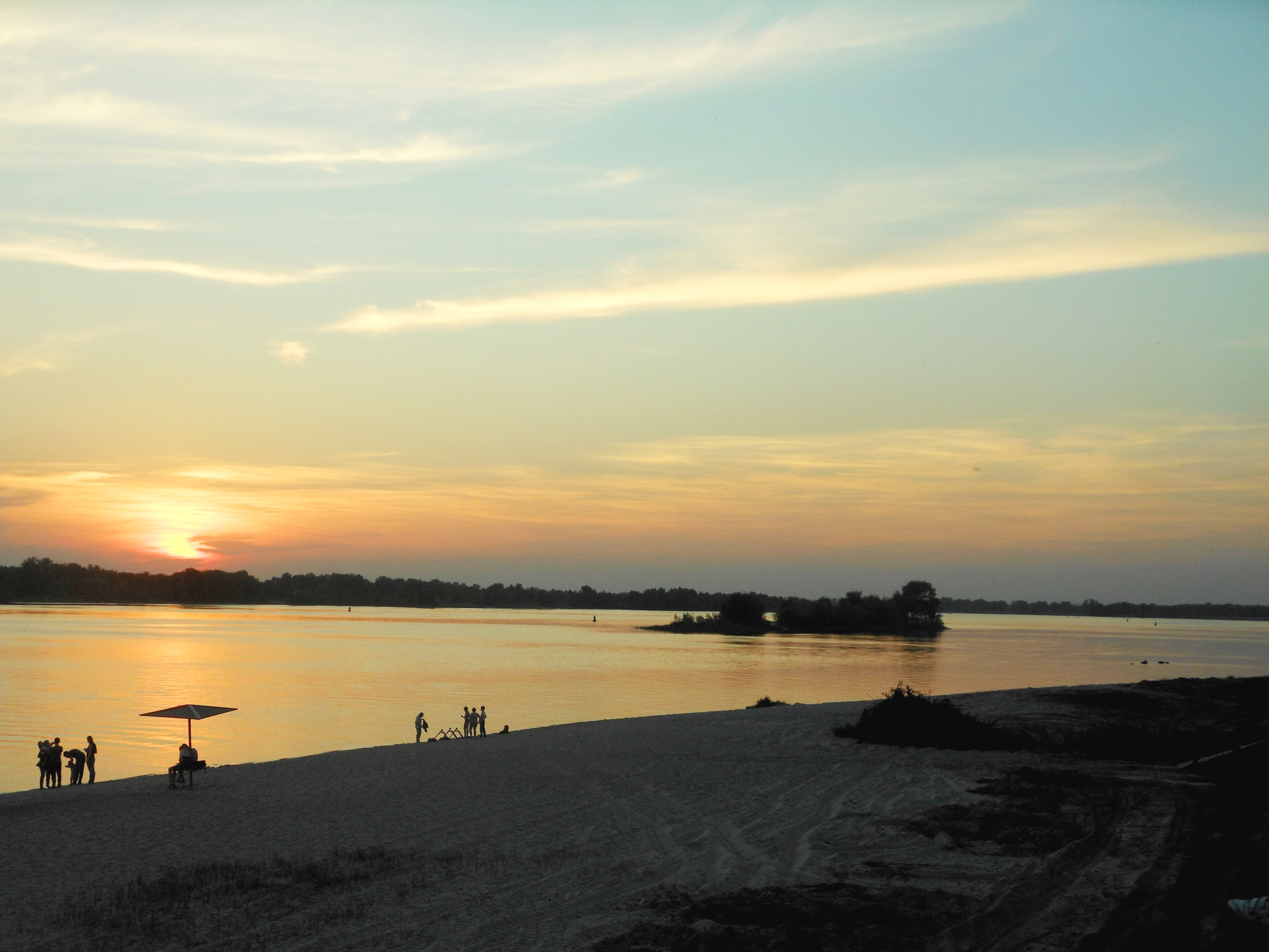 Білецьківські плавні, Кременчуцький р-н, о. Зелений, Диньки, Фантазія, Градизьке л-во, кв. 33-43, Краківське л-во, кв. 1-8. Плавні біля с. Білецьківка